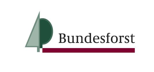 Logo von Bundesforstverwaltung als Sparte der Bundesanstalt für Immobilienaufgaben